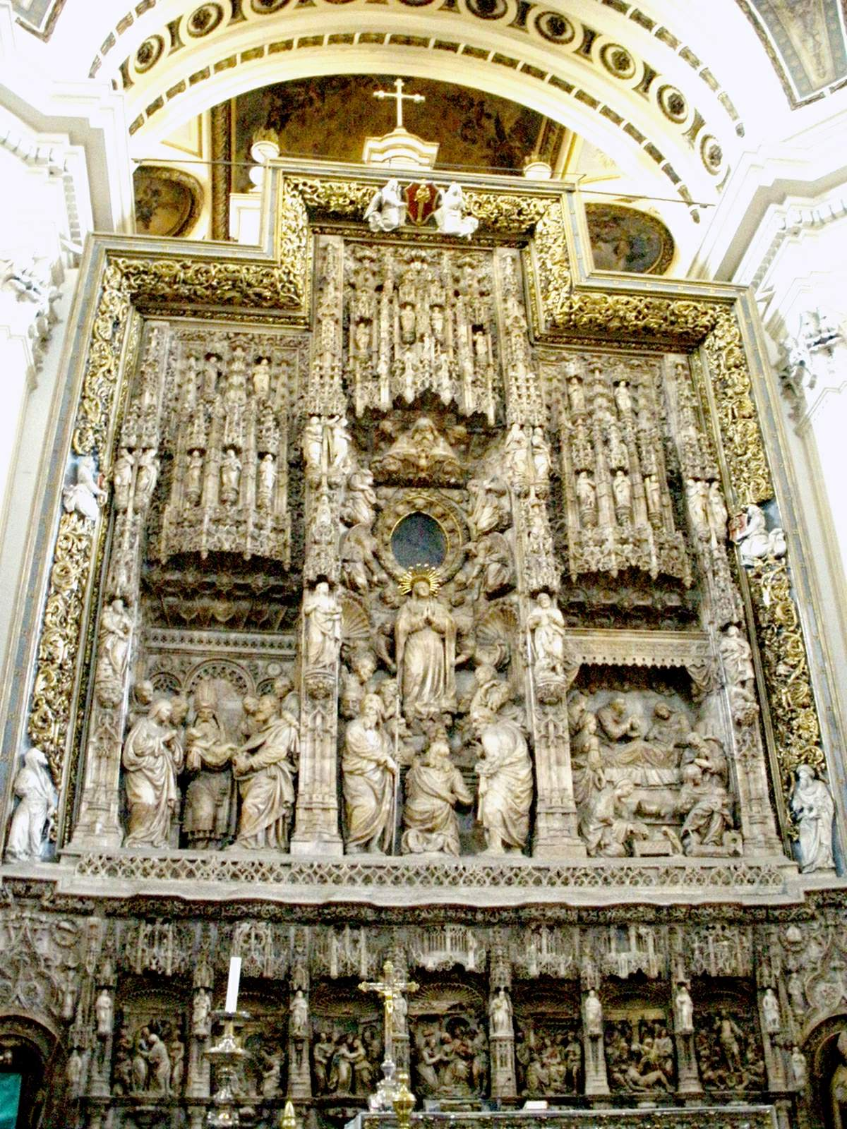 Basílica de Nuestra Señora del Pilar (Zaragoza). Retablo mayor, obra maestra de Damián Forment